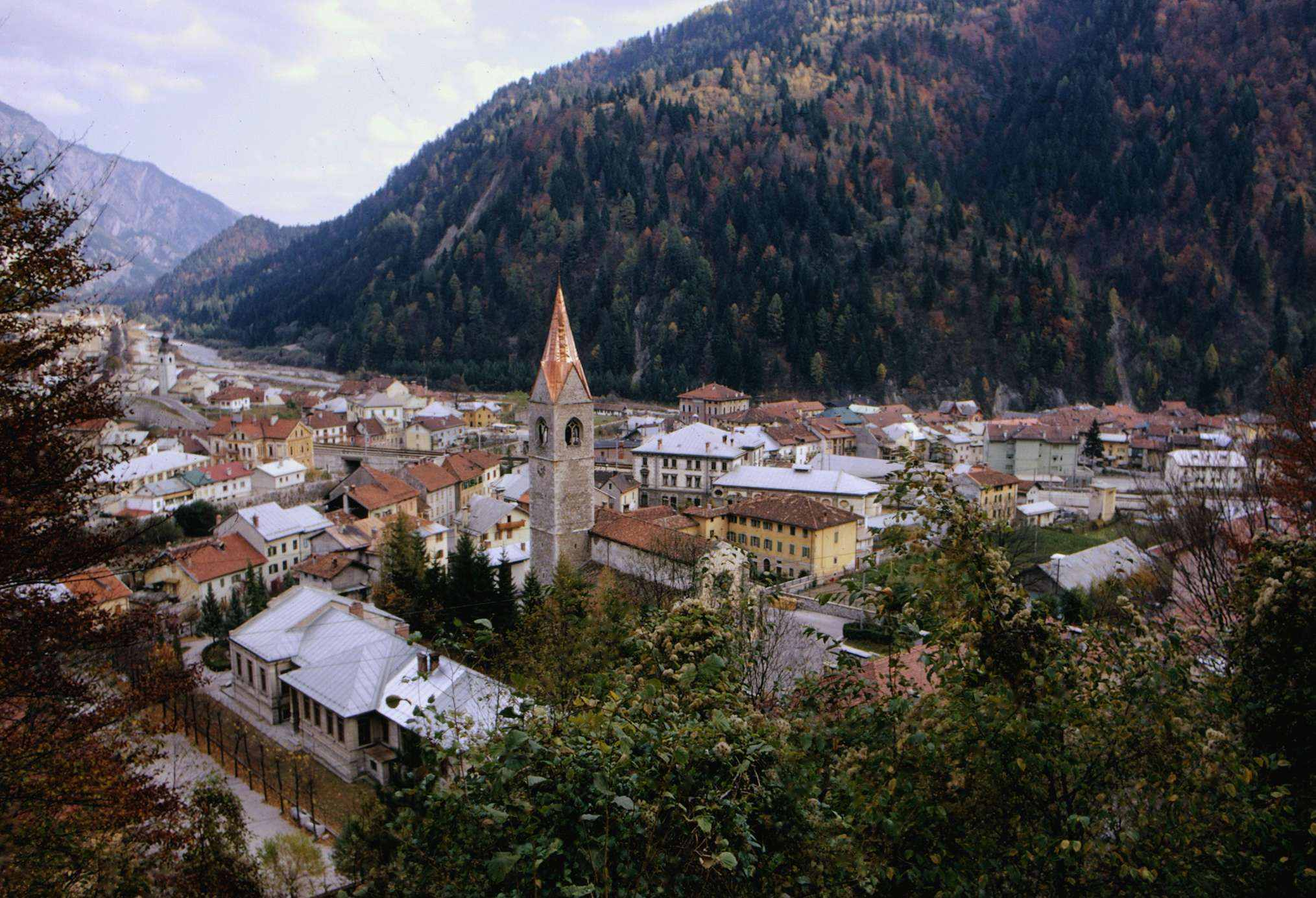 Celso Mosca, paesaggio di Pontebba